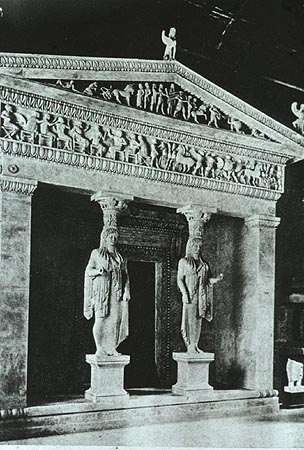 Tesoro dei Sifni, Delfi FONTE: "Fouilles de Delphes", 11 (1900) Il copyright per l'immagine è scaduto.